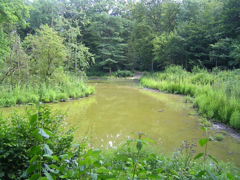 Etang dans le parc de la poudrerie Photo personnelle (own work) de Marianna